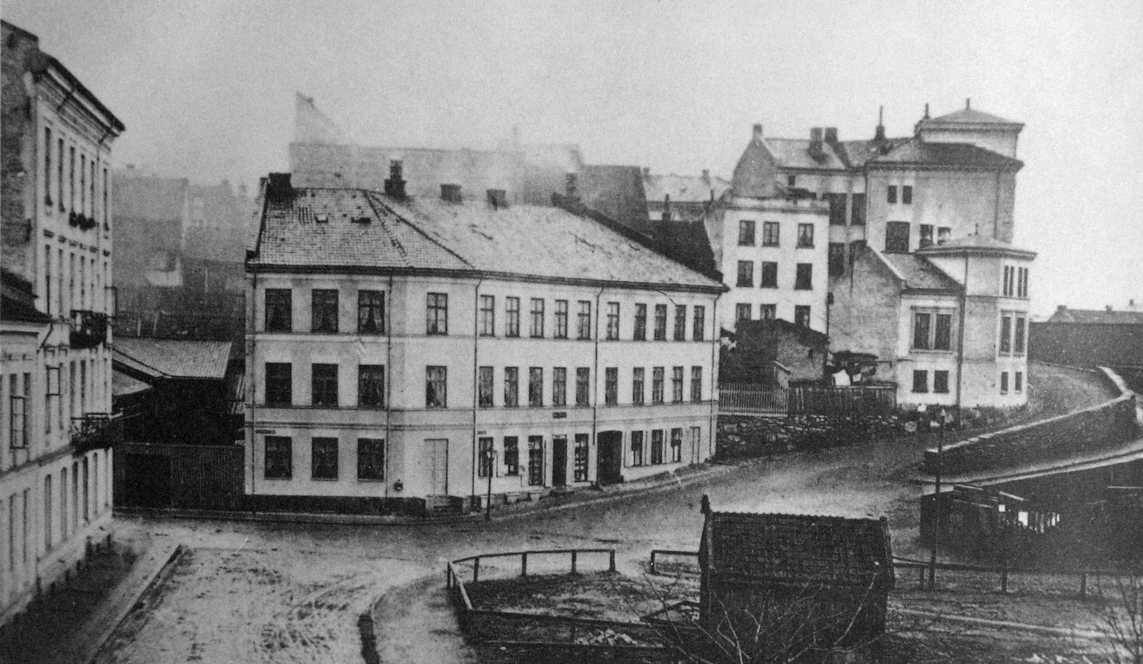 Piperviksbakken, ca 1870.